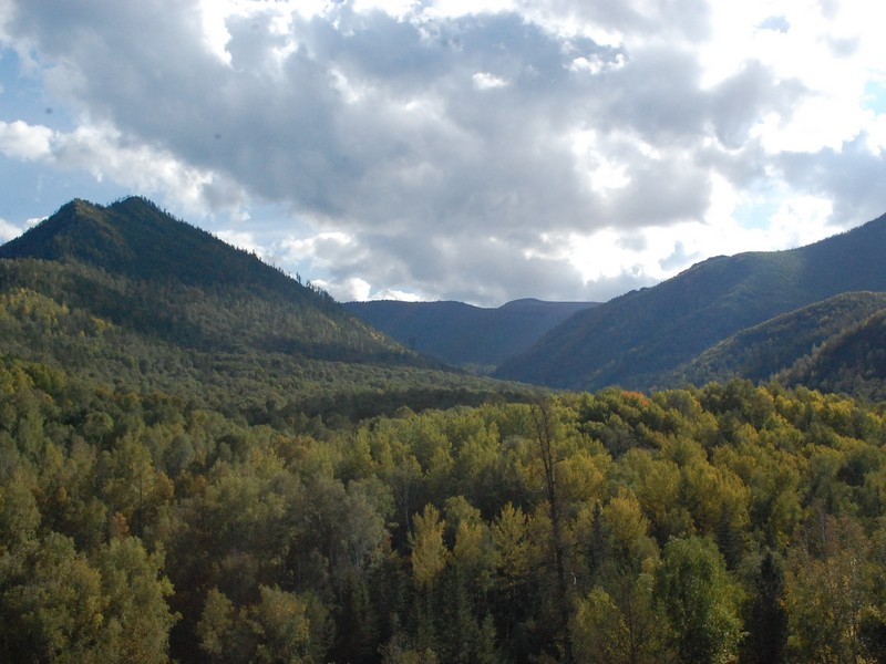 Горы в окрестностях села.